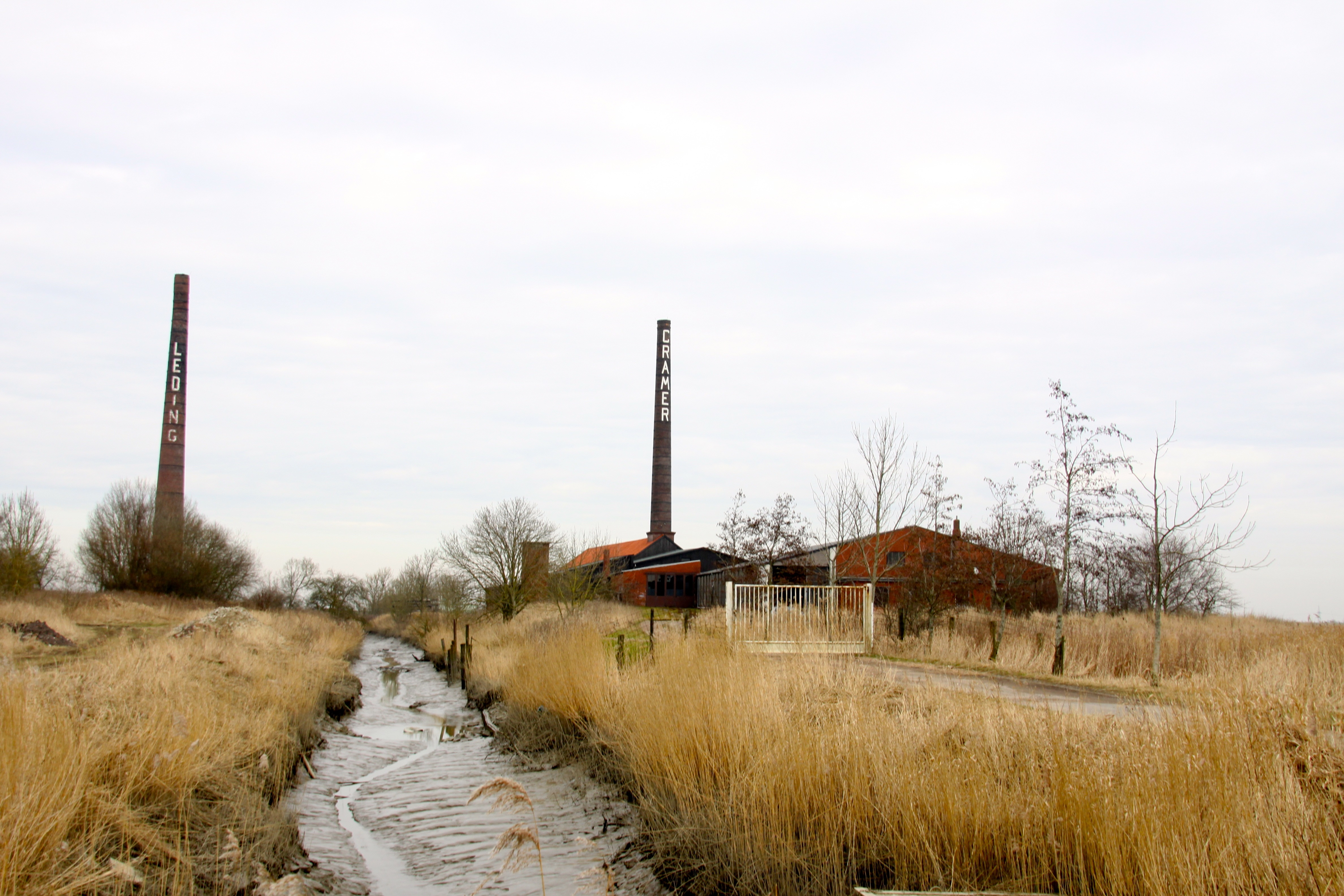 Das Ziegeleimuseum in Midlum